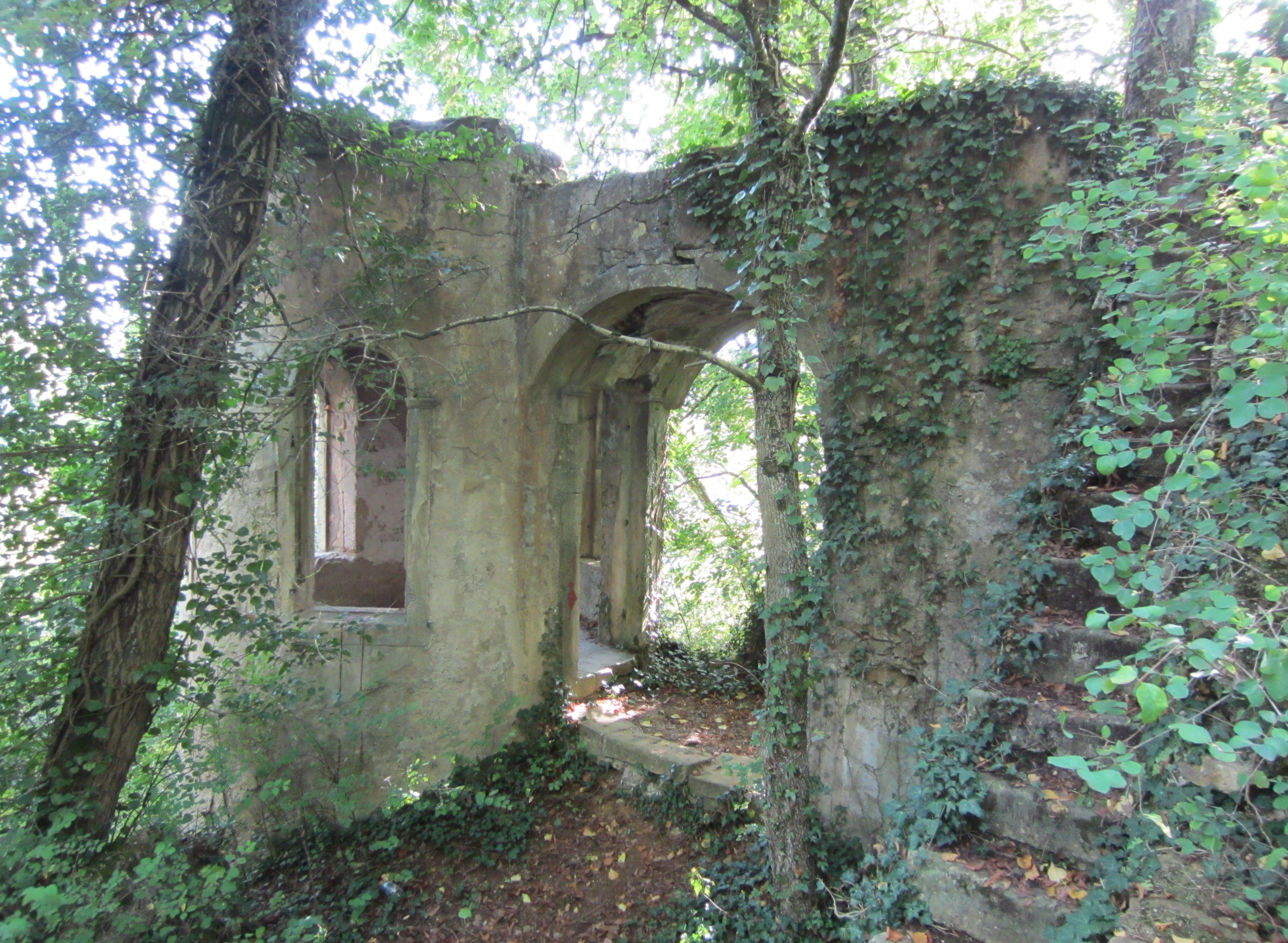 Description tour du diable Jussy Date16 September 2011Sourcemon appareil photoAuthorAimelaimePermission(Reusing this file) tour du diable Jussy